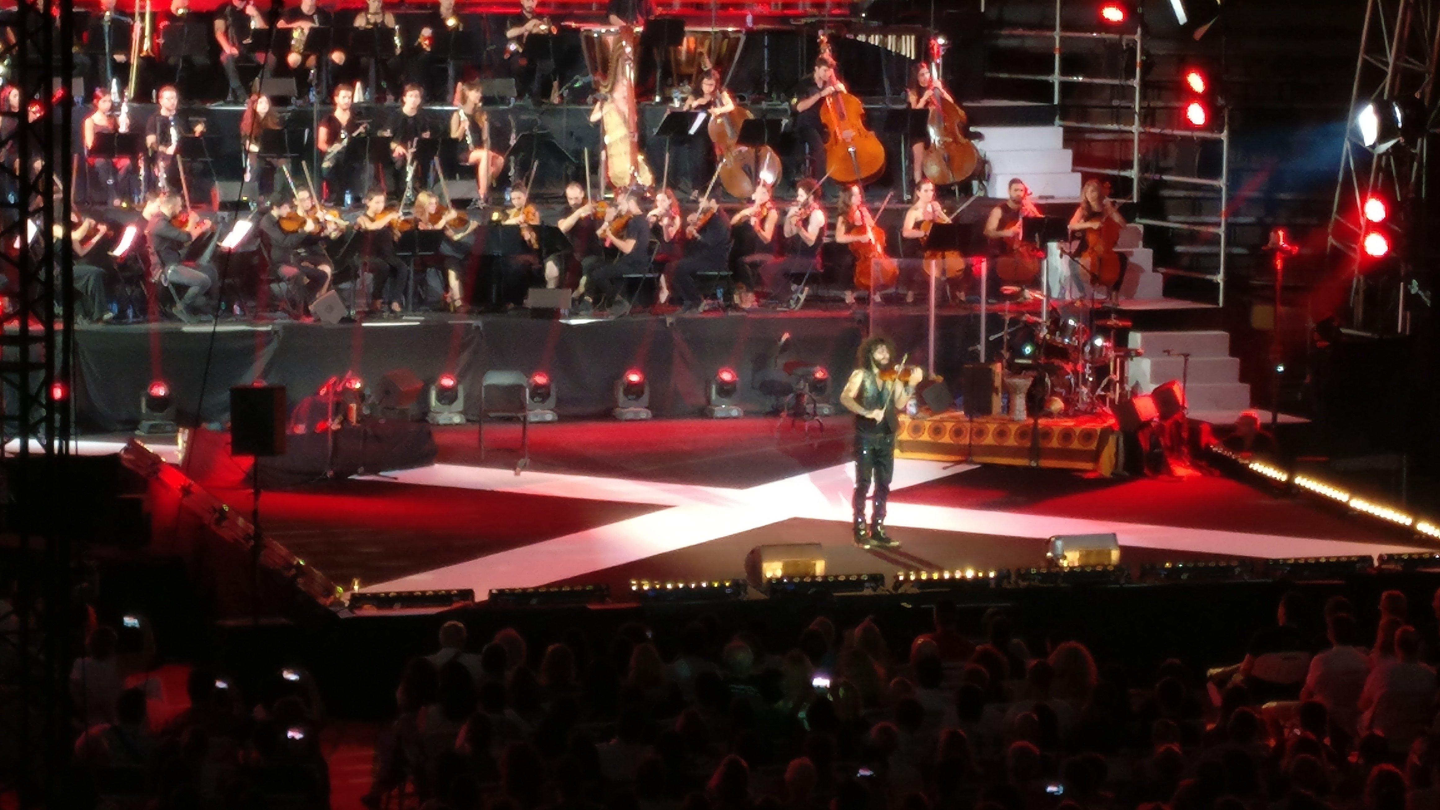 Concierto del violinista Ara Malikian en la plaza de toros de Valencia.